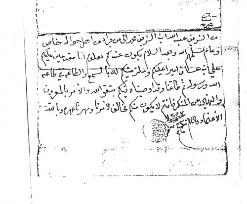 وثيقة قبيلة حوالة من الأشراف، يعود تاريخها الى 1257هـ